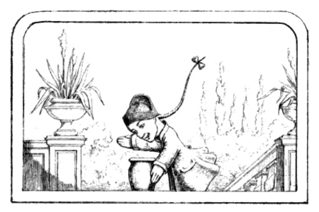 Le pot de confitures.